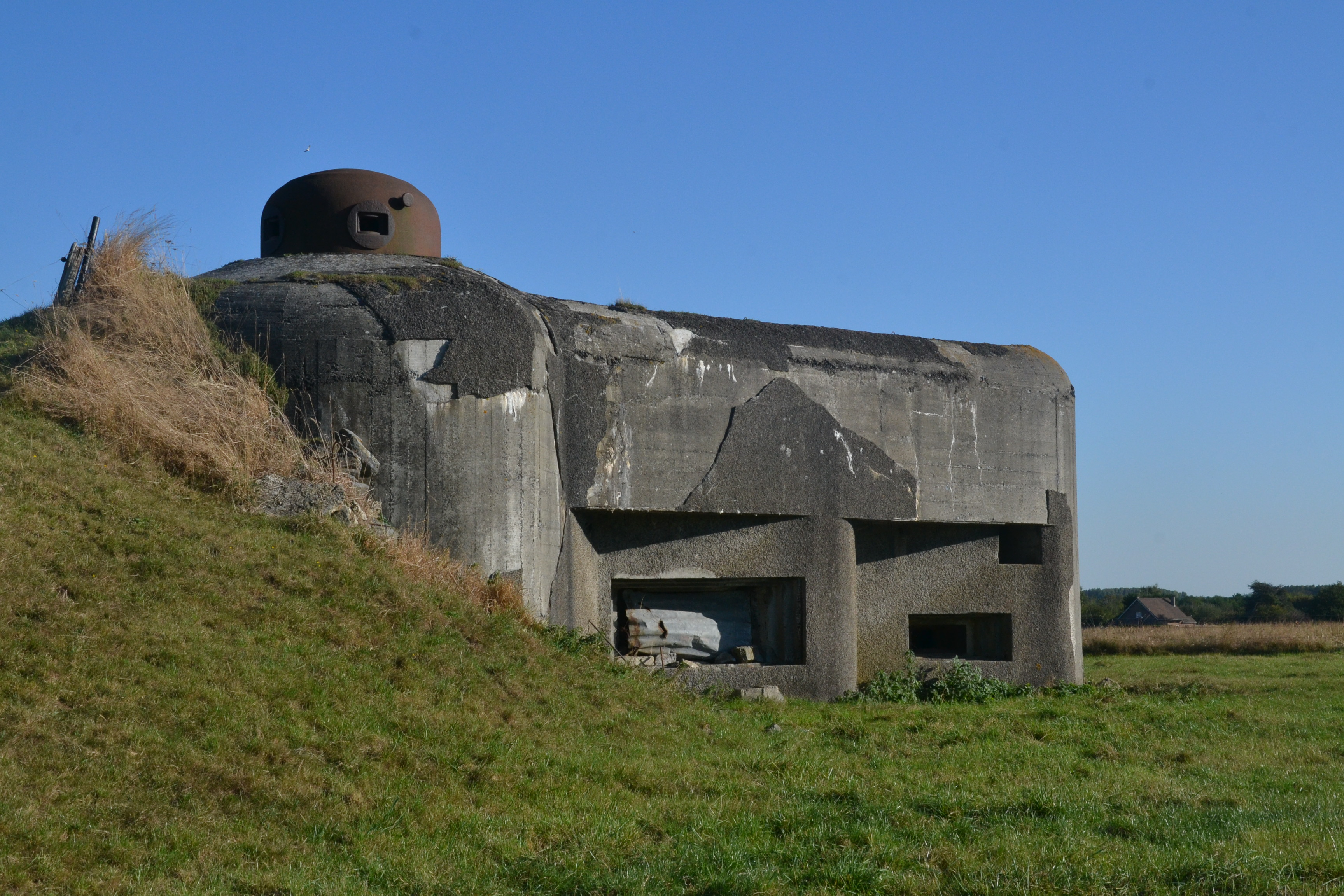 Casemate de la ligne Maginot près de Maulde (Nord, France).